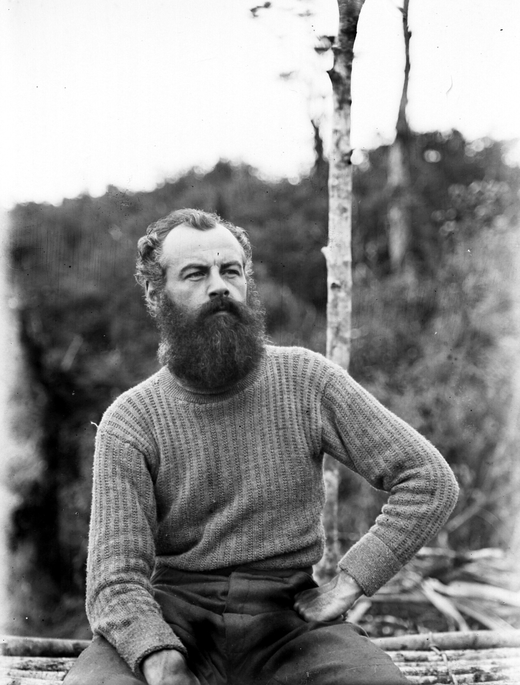 Deze foto is gemaakt tijdens de derde Zuid-Nieuw-Guinea Expeditie van 1912-1913.